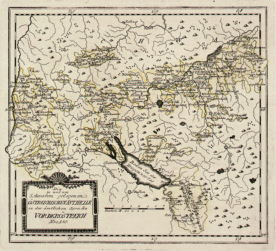 Die in und um Schwaben gelegenen Östreichischen Antheile in der ämtlichen Sprache Vorderöstreich. Nro. 150. Kolorierter Kupferstich